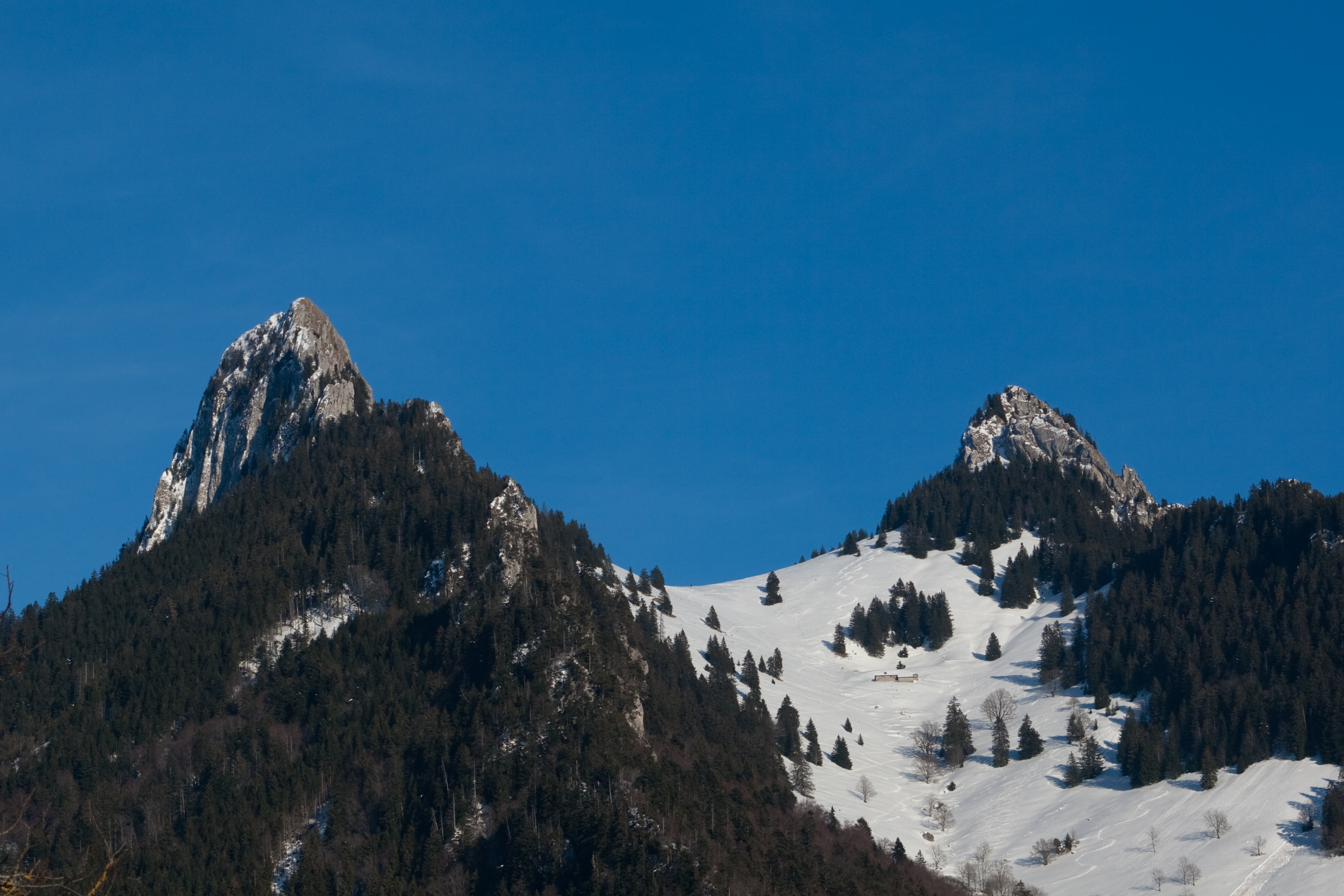 La Dent de Broc au-dessus de Gruyères dans le canton de Fribourg, en Suisse.